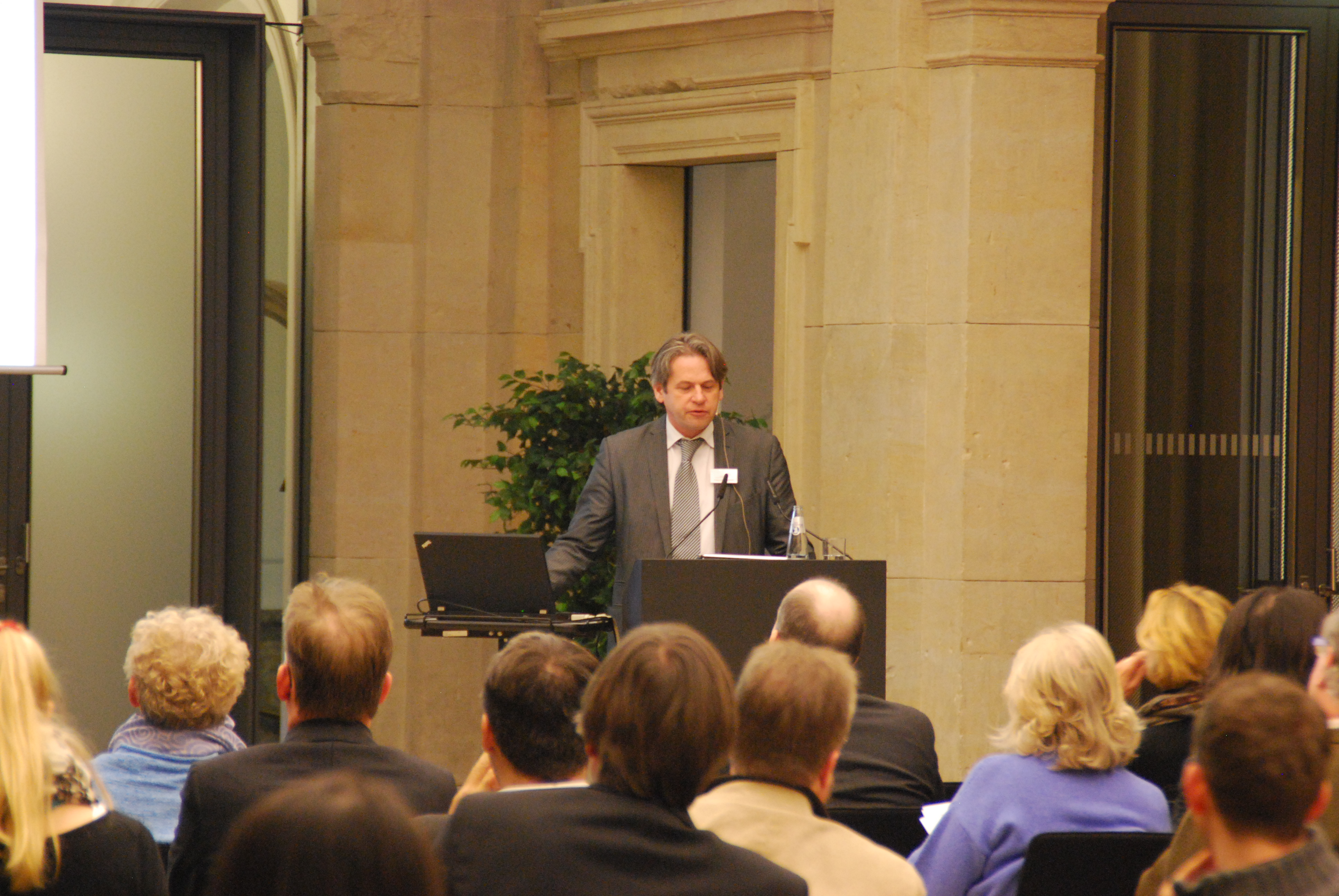 Internationale Tagung "Translatio nummorum" im November 2011 in der Berlin-Brandenburgischen Akademie der Wissenschaften.